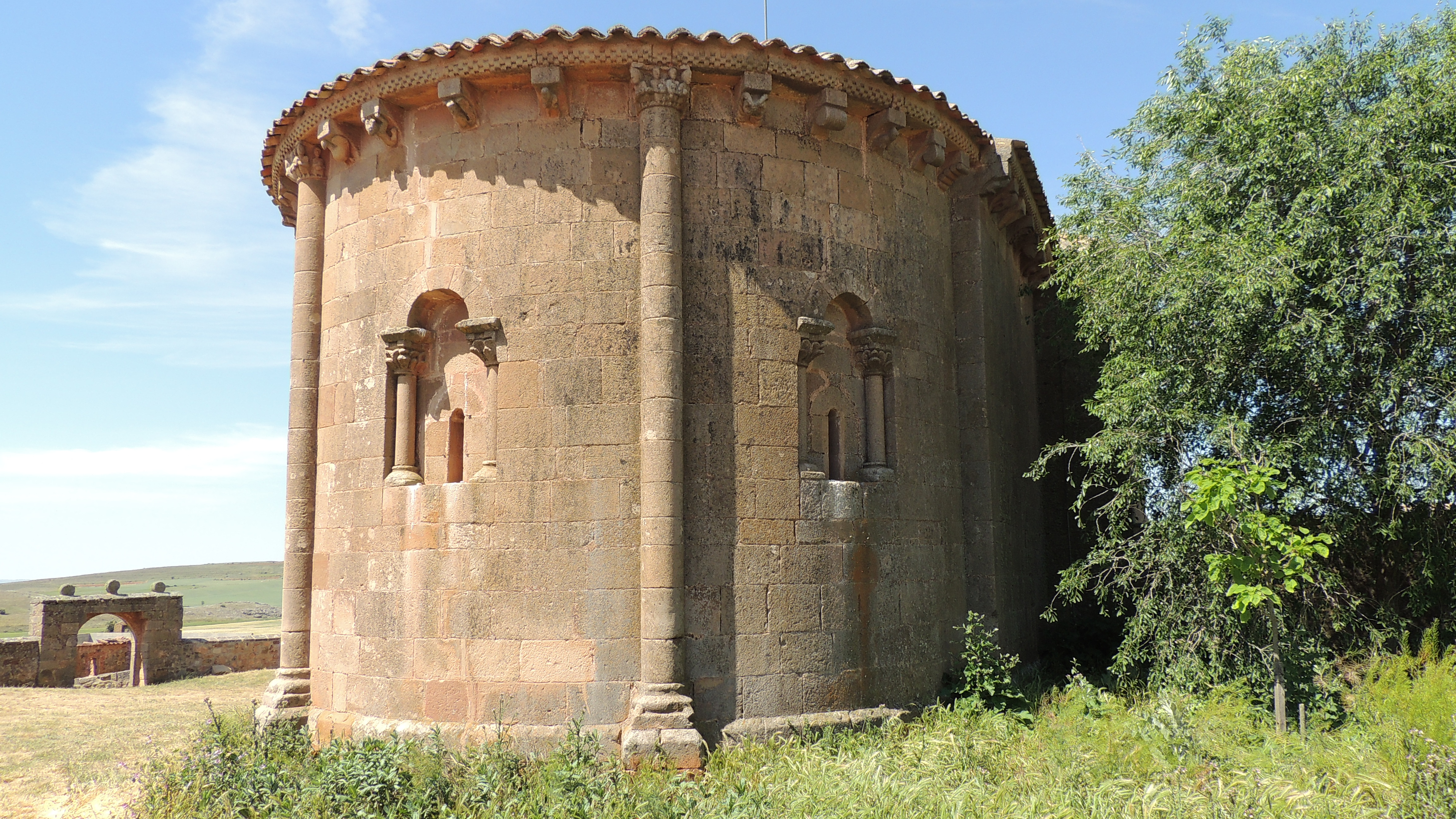 Ábside